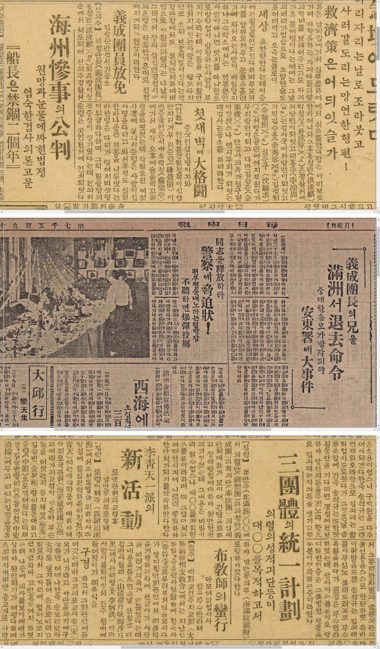 의성단원들의 무죄 석방 보도, 구속된 의성단장 형의 강제 퇴거명령에 경찰에 협박장을 보낸 의성단, 독립운동 3단체의 통합.